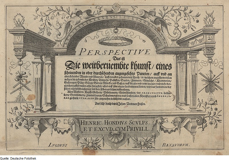 Original image description from the Deutsche FotothekArchitektur & Geometrie & Perspektive & Bogen & Säule